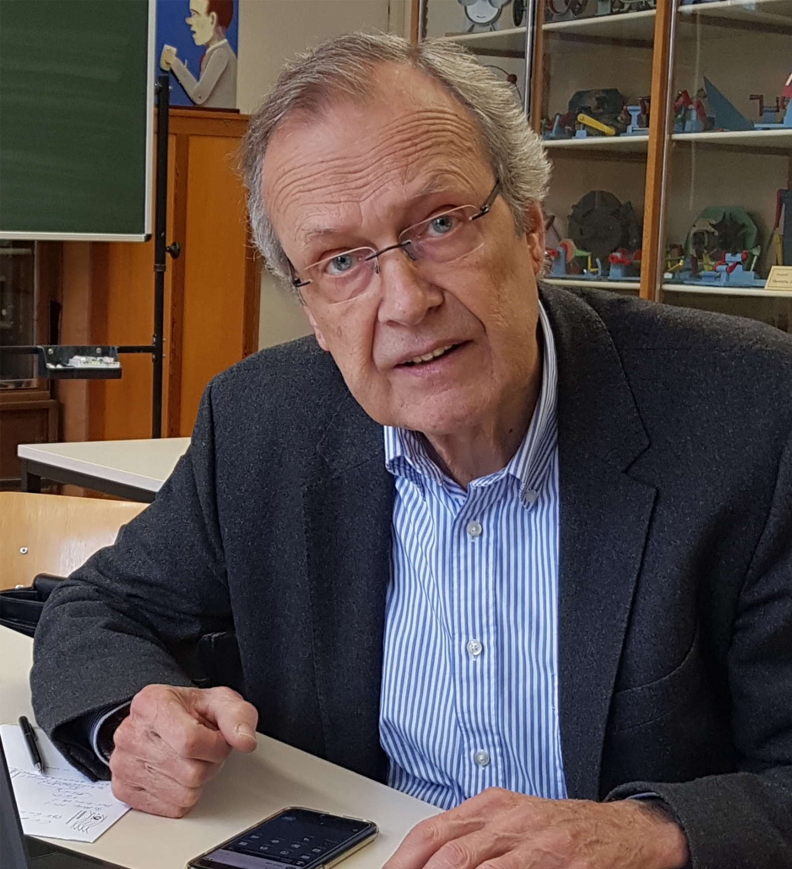 Prof.Dr. Hans-Detlev Saeger, fotografiert am 19.2.2020 mit seinem Einverständnis